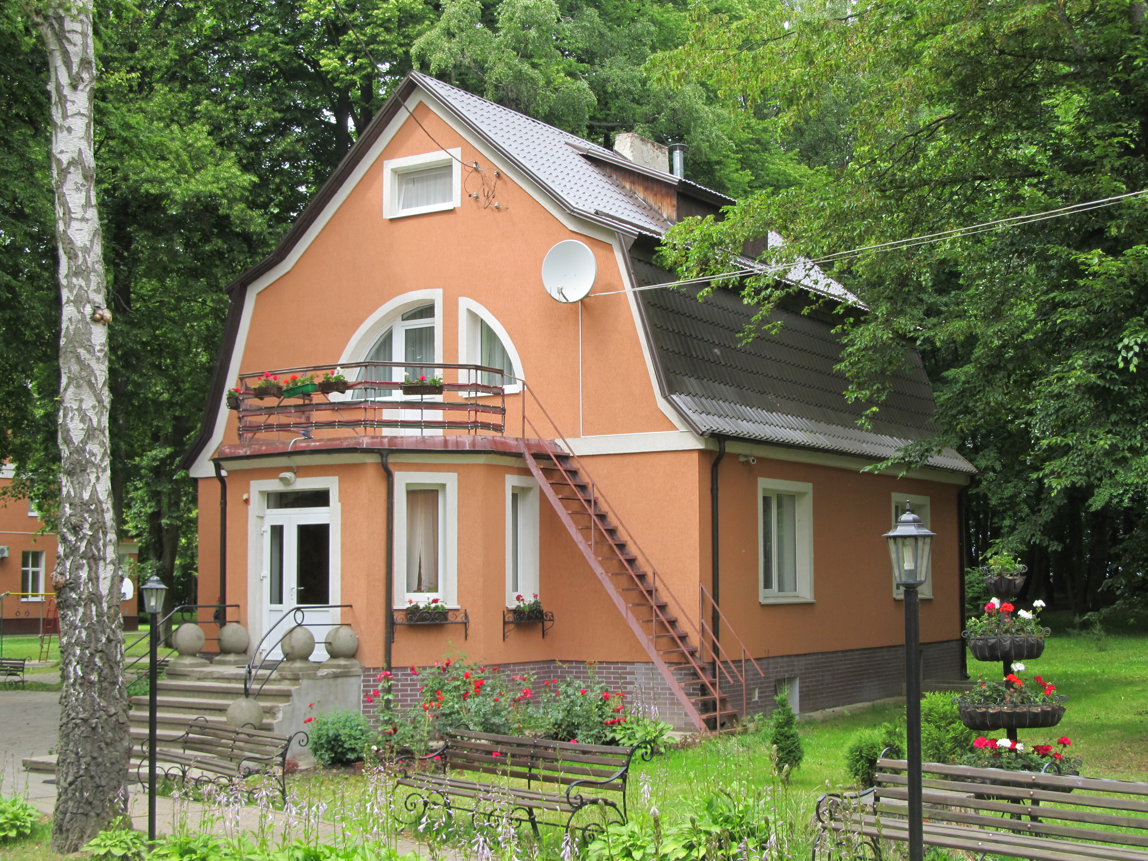 Вилла «Хелена» (арх. П. Раабе, дата строительства не установлена), курорт Отрадное. Ныне - корпус №3 детского пульмонологического санатория «Отрадное»